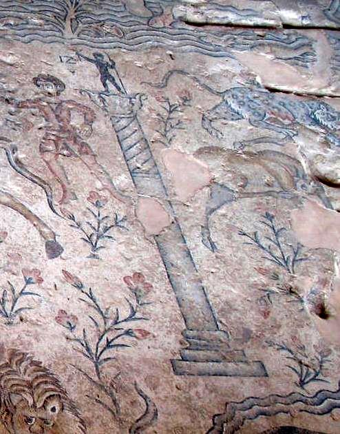 חלק מ"פסיפס הנילוס" שבציפורי. ניתן לראות עבד עומד על עמוד ומחזיק בידו לפיד לצורך העברת הודעות.